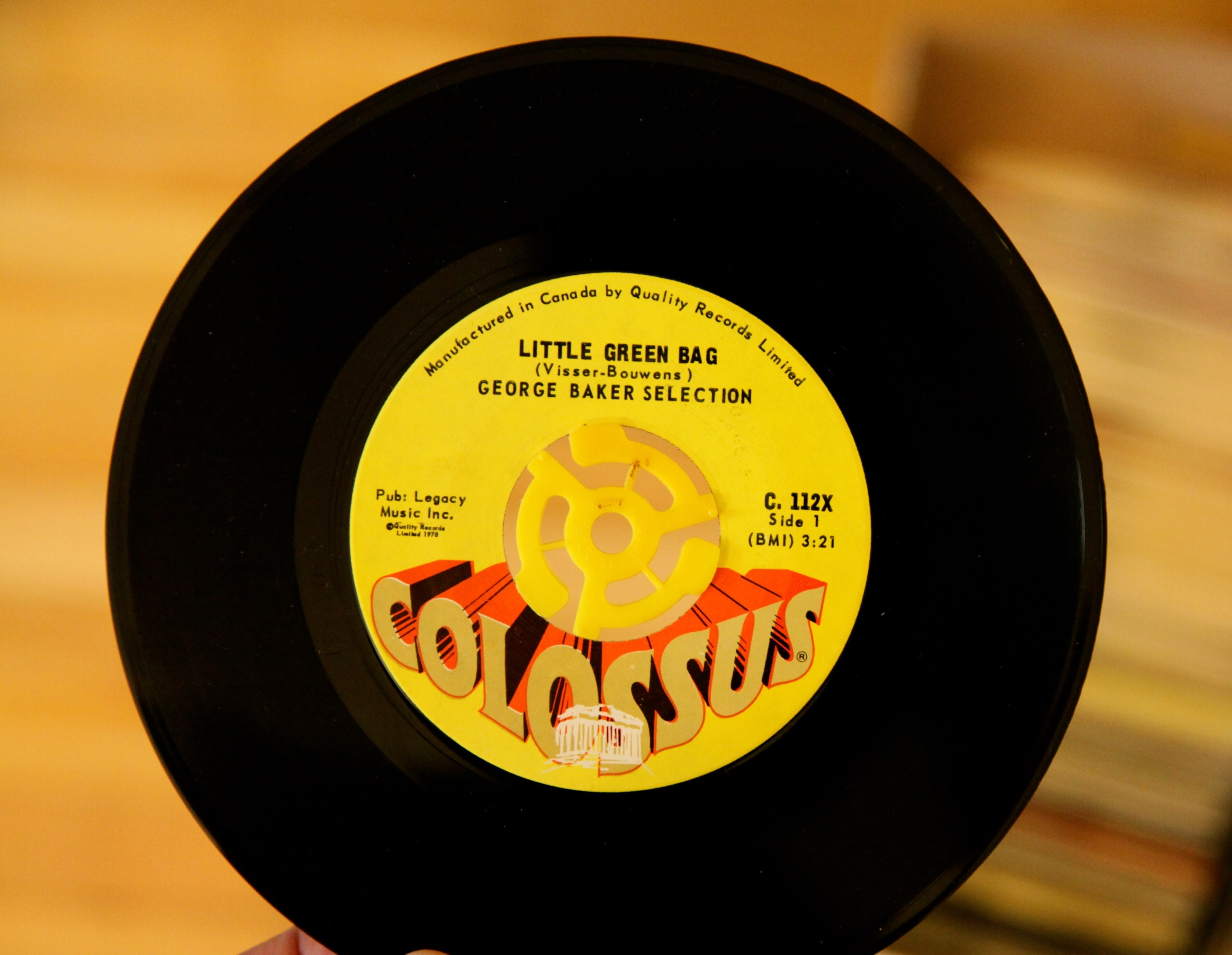 Sencillo de "Little Green Bag".